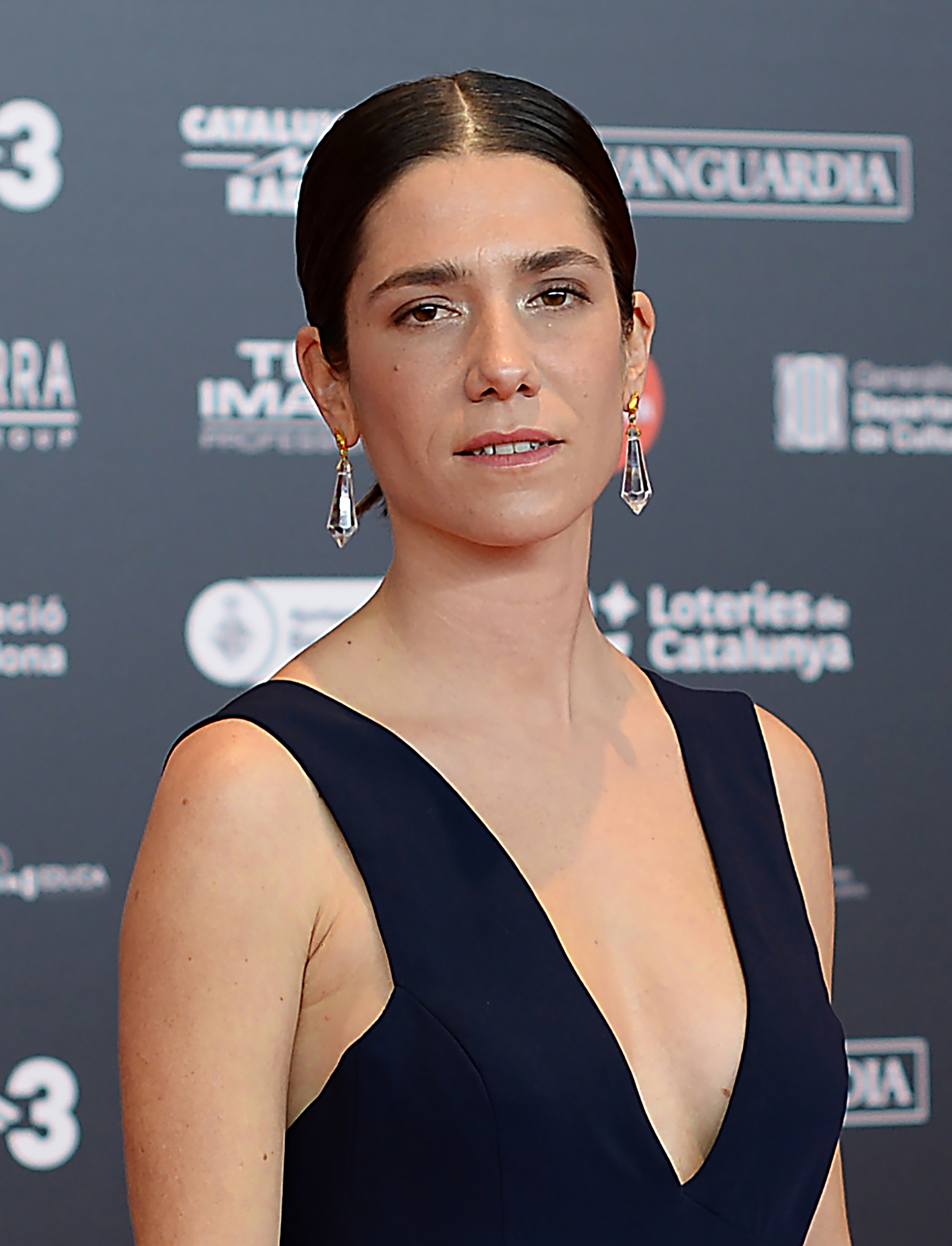 Bruna Cusí, actriu, XII Premis Gaudí (2020)